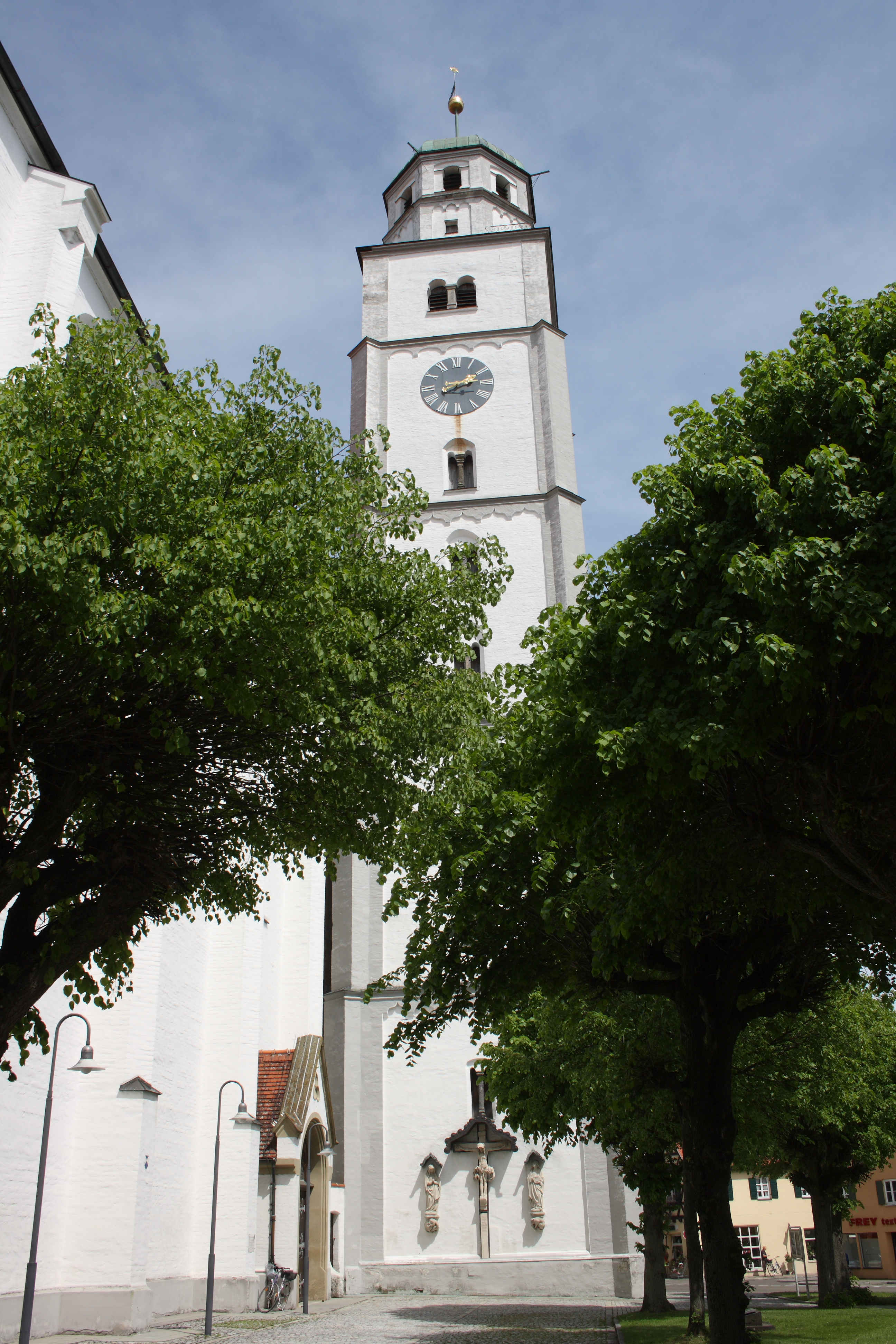 katholische Stadtpfarrkirche St. Martin in Lauingen im Landkreis Dillingen an der Donau (Bayern)